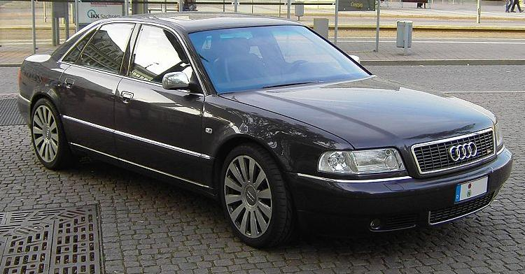 (Original text: Audi S8 (4.2l, 265 kW)) Fotograf: CrazyD, de:1. Mai de:2005 andere Versionen: Frontansicht links (siehe Thumb)